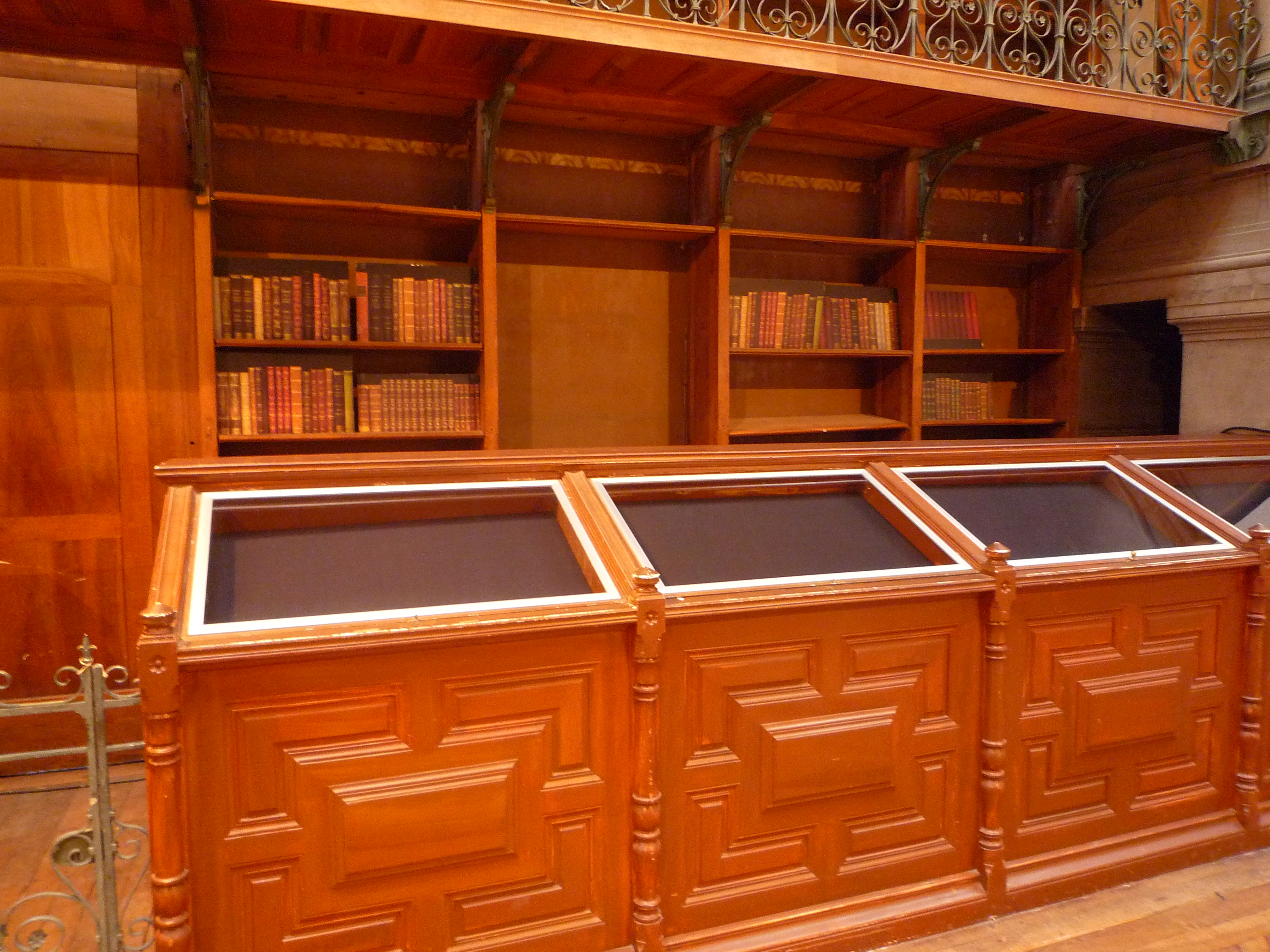 Boiserie salle de l'ancienne bibliothèque dans le musée-bibliothèque de Grenoble.